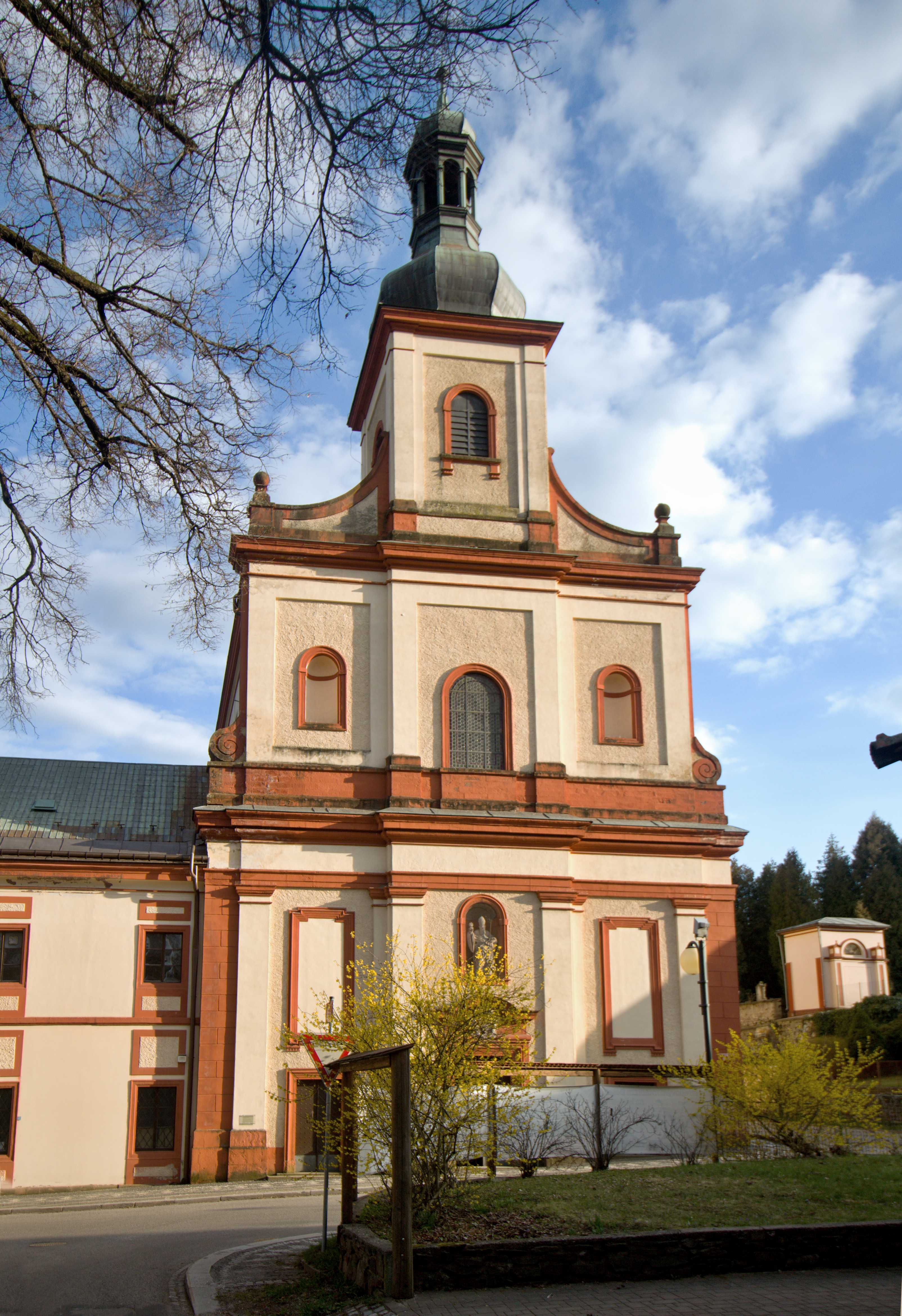 Augustiniánský klášter ve Vrchlabí